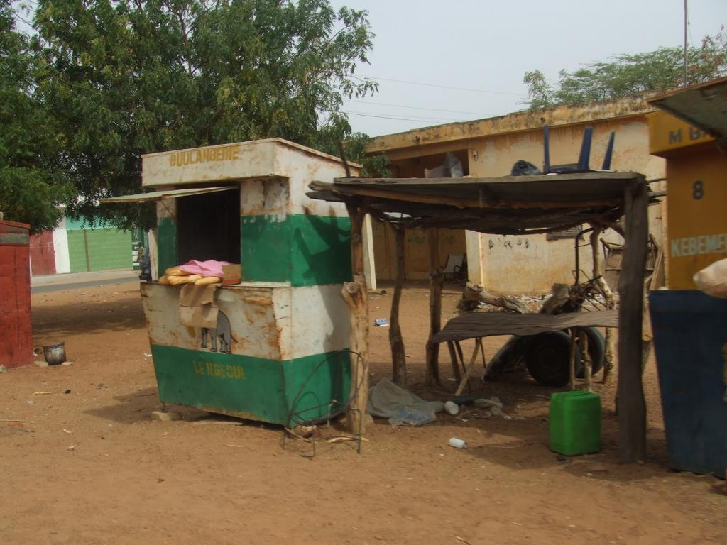 Un stand de vente de pain à Louga, Sénégal